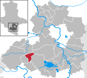 Nemsdorf-Göhrendorf in Saxony-Anhalt - Saalekreis